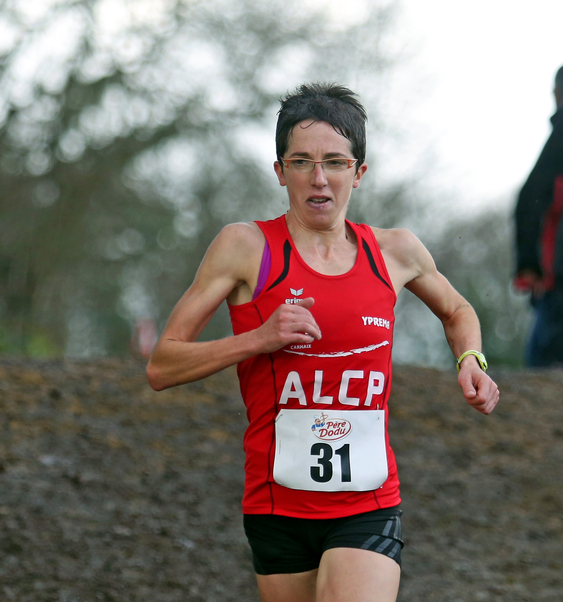 Sandra Levenez championne du monde de duathlon